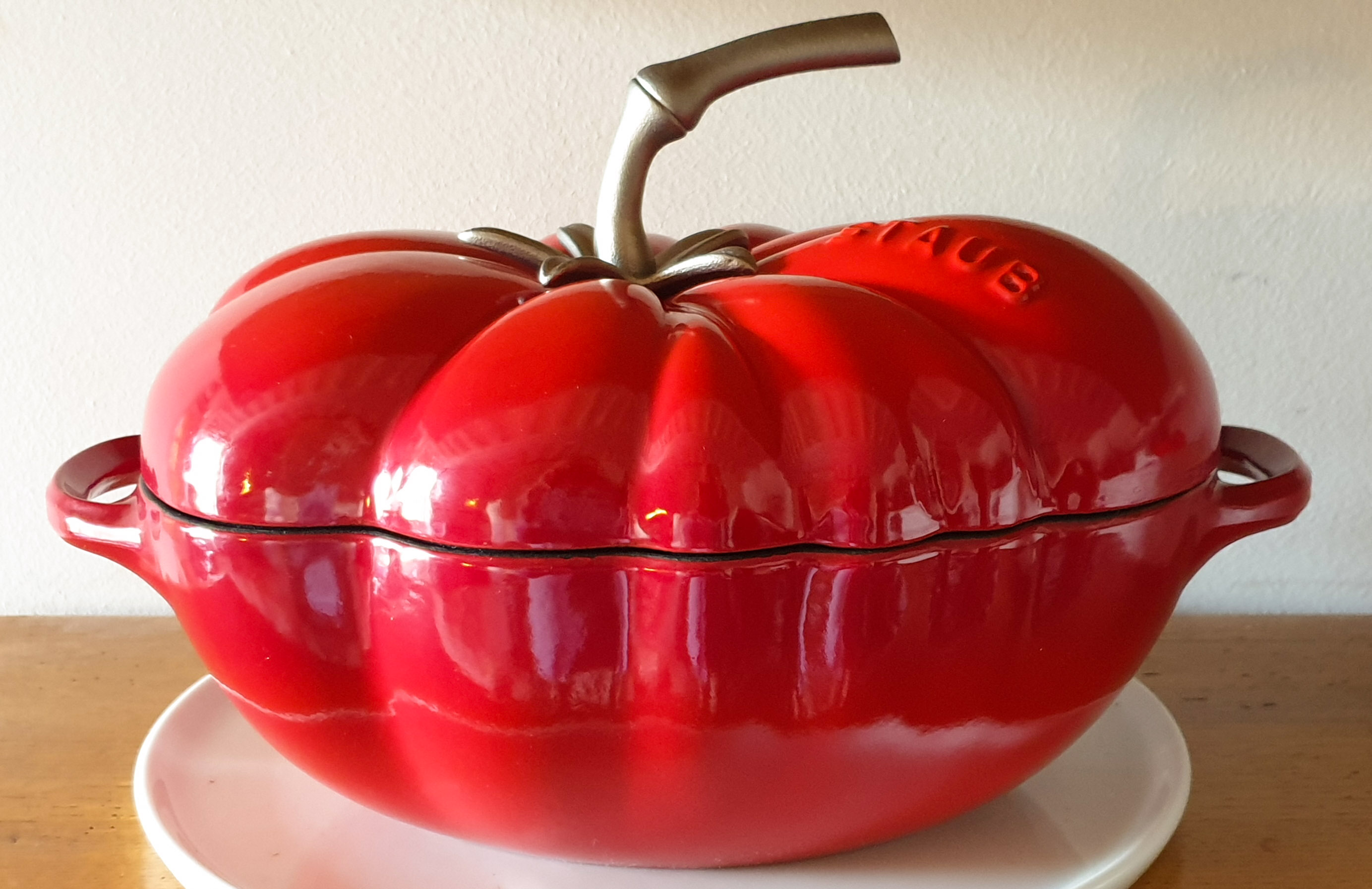 Cocotte Staub en fonte émaillée. Série spéciale tomate. Au catalogue en 2019.